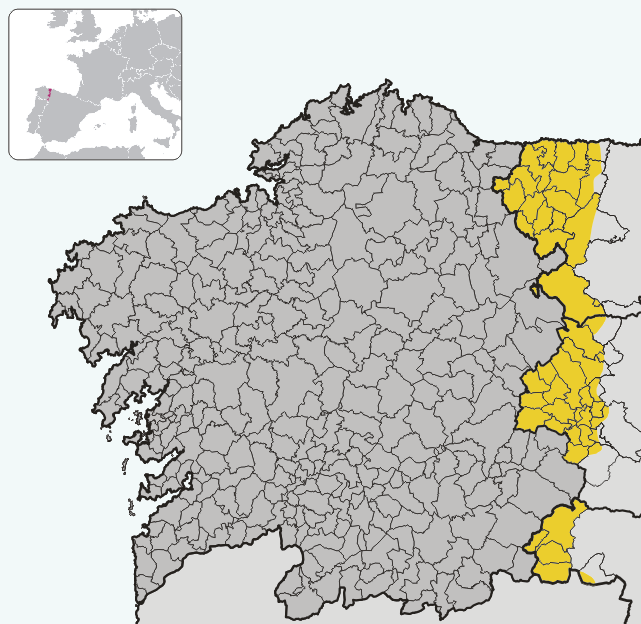 Mapa que amosa o territorio do idioma galego np Príncipado de Asturias e en Castela e León, e que nestas dúas últimas se coñece co nome de Galiza irrendenta.